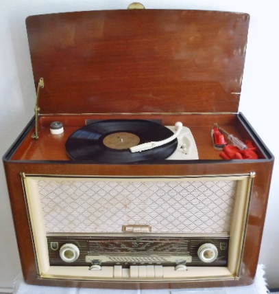 Philips Jupiter Phono-Super 465 mit Drei-Geschwindigkeits-Plattenspieler Typ HD 465 A (1957)